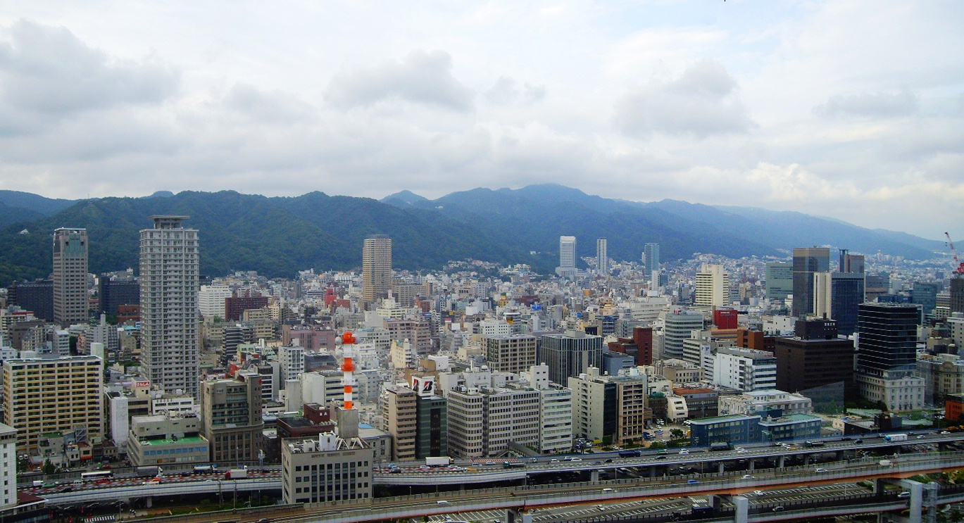 Kobe City Chuoku.